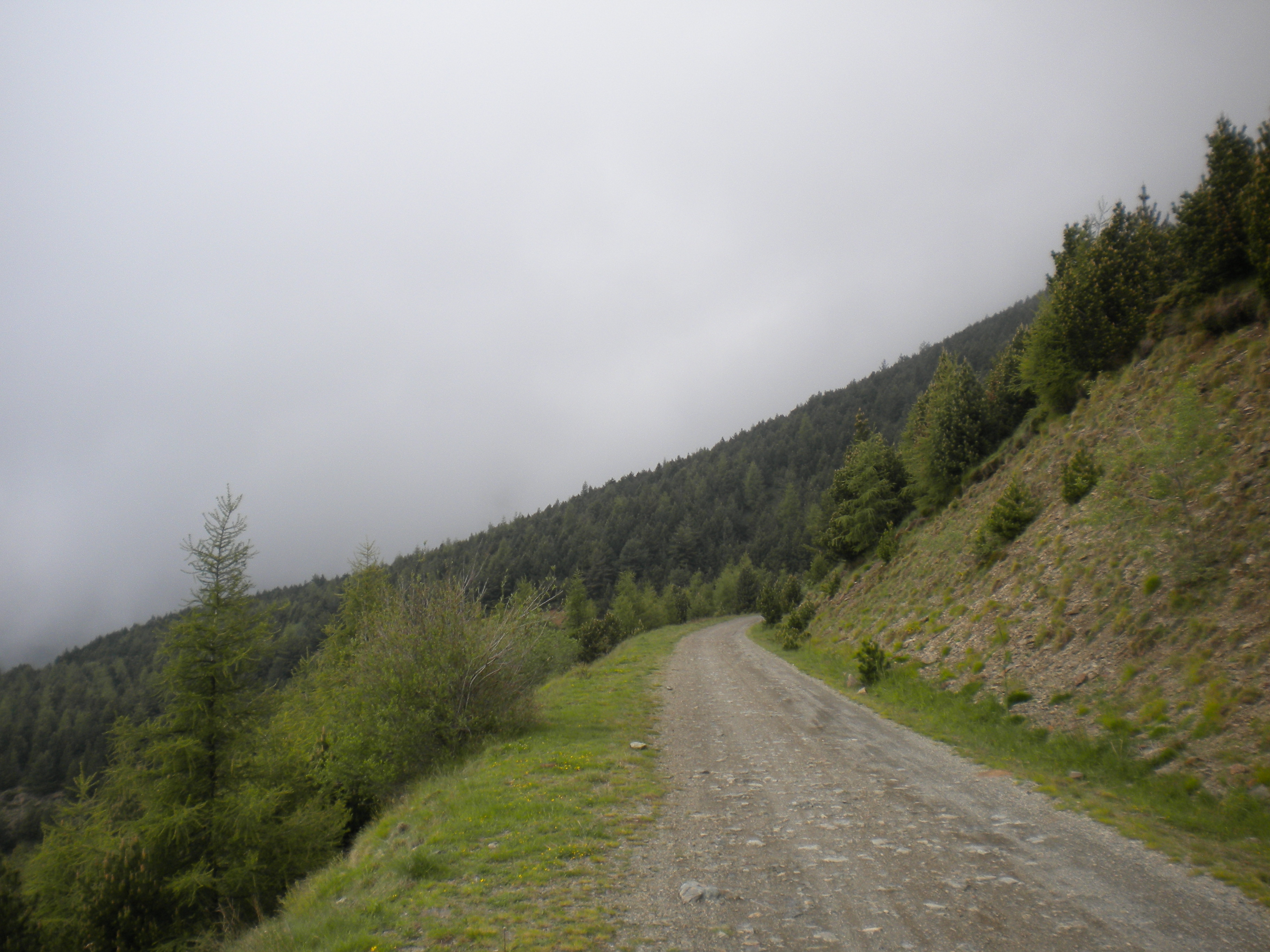 Pista forestal de Tregurà a Pardines, al vessant sud del Puig Cornador al límit municipal entre Pardines i Ribes de Freser. (Ripollès)